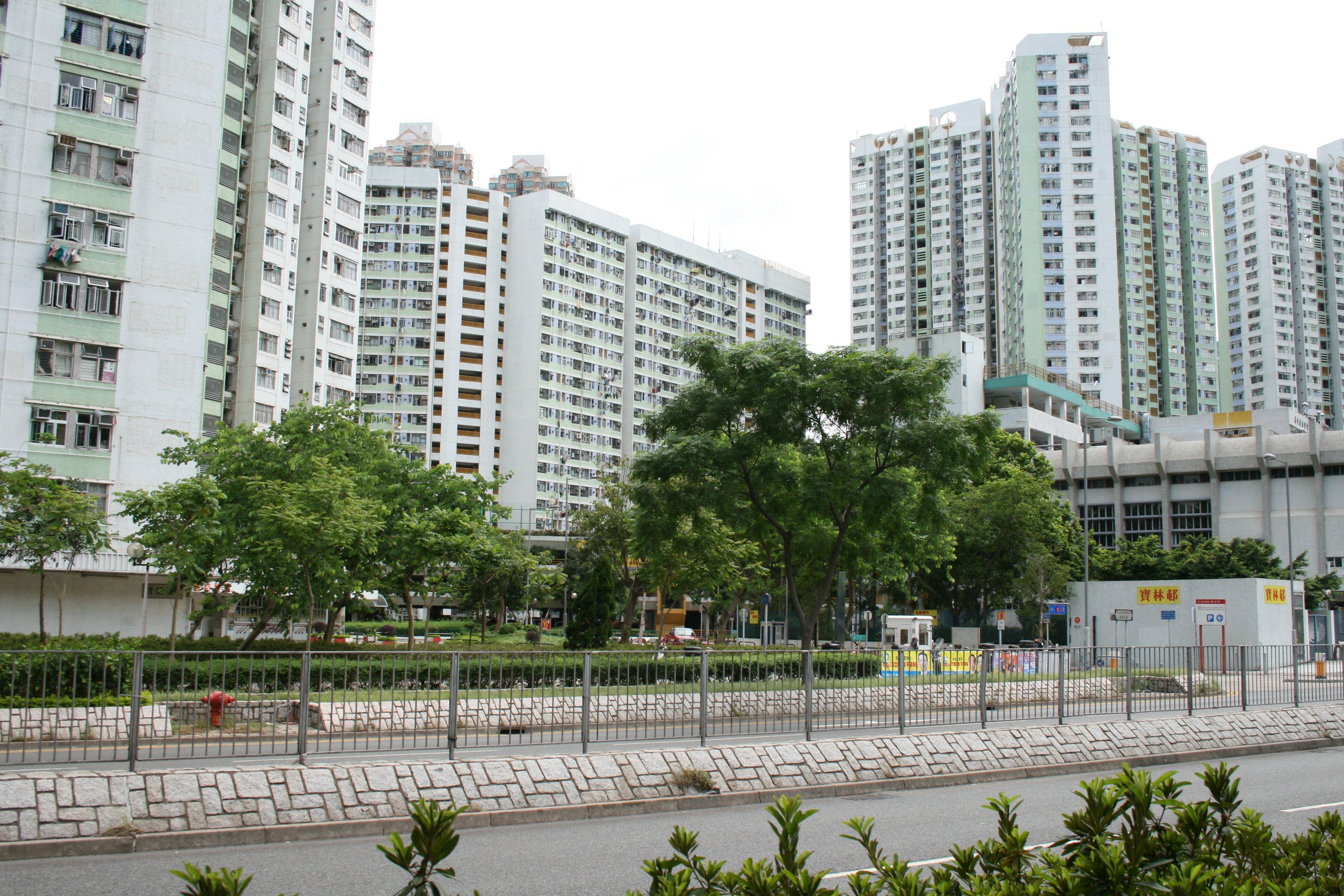 Po Lam Estate 將軍澳寶林邨